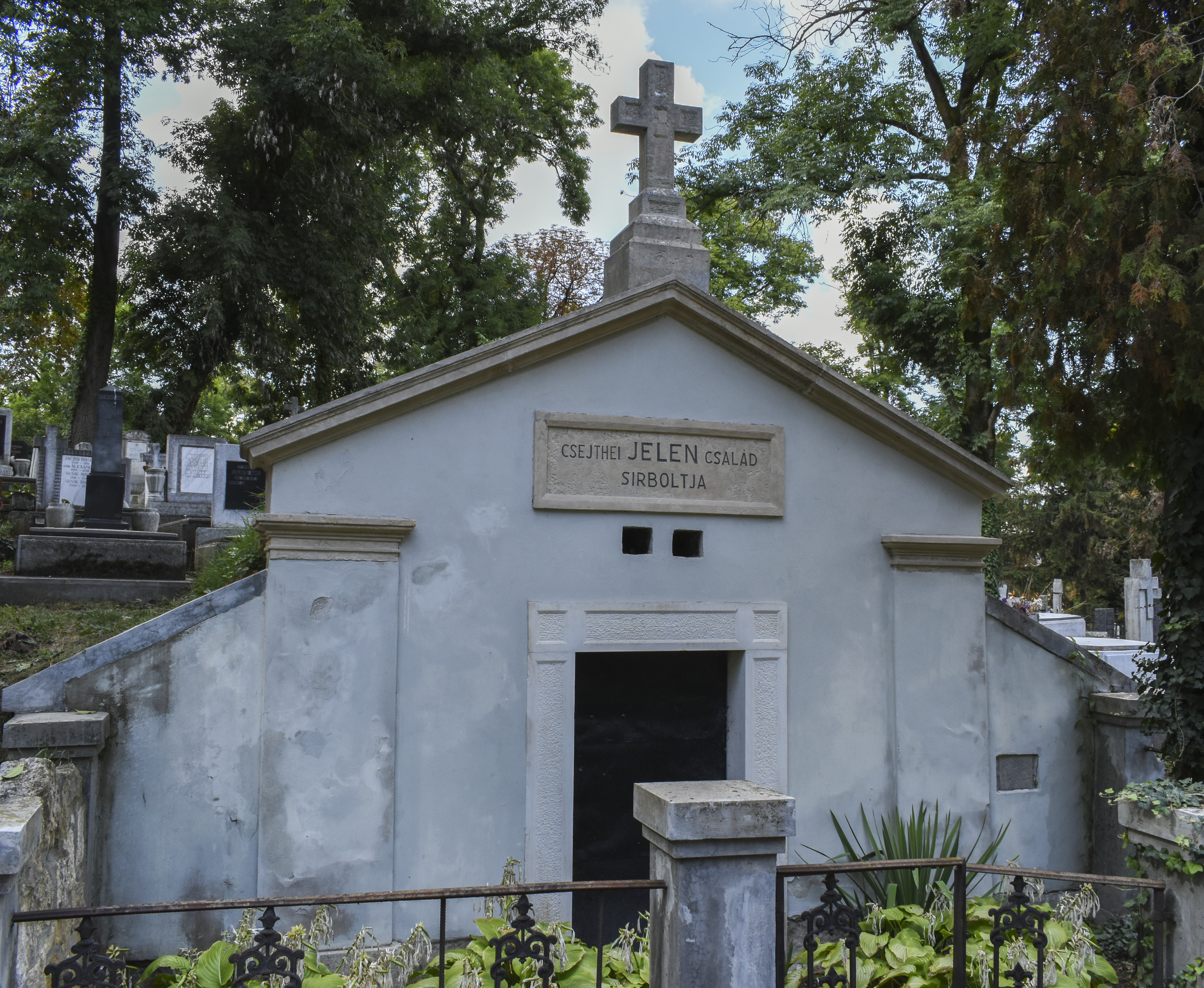 Cavou Jelen 1585 026